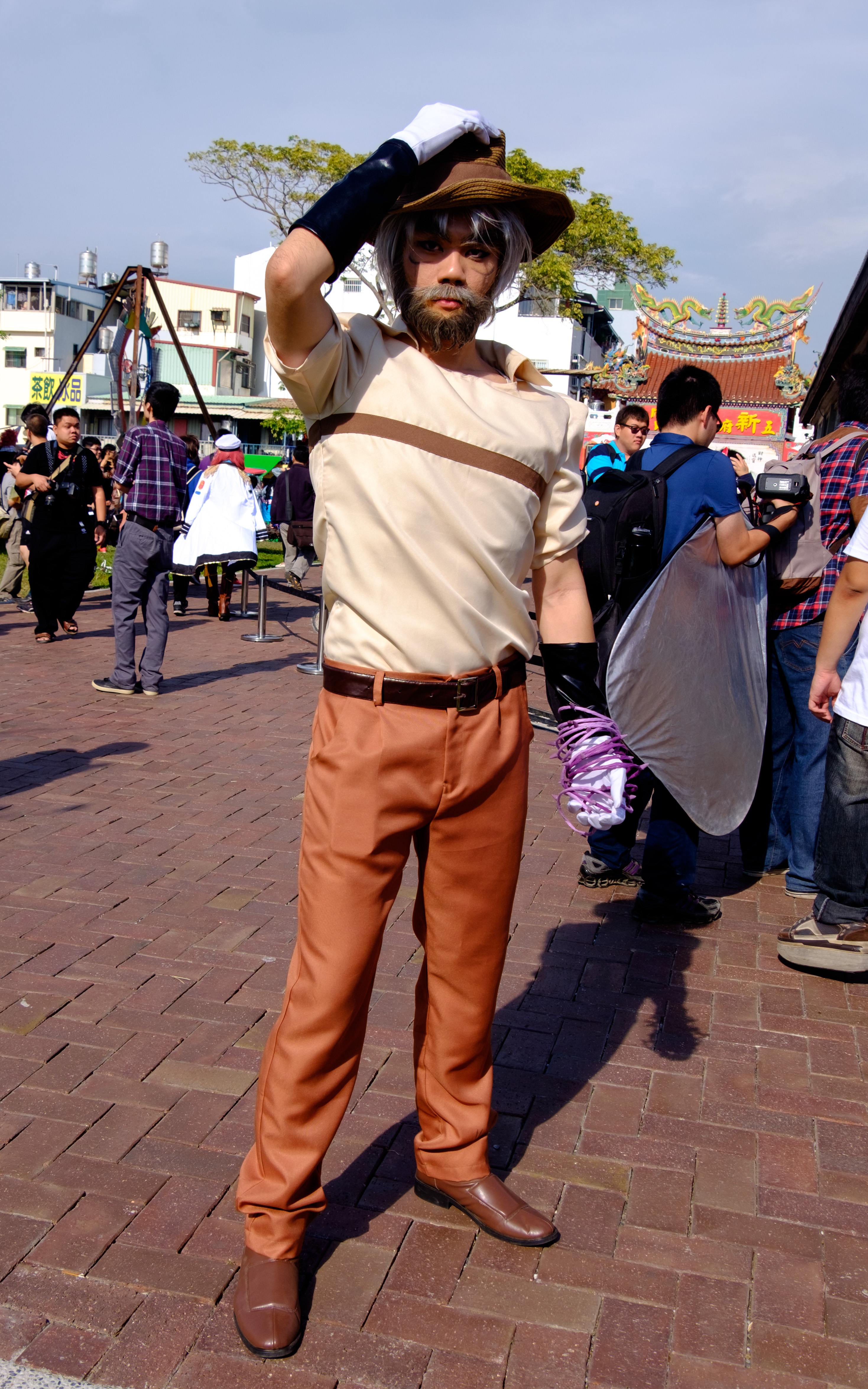 2015駁二動漫祭第二日下午，＜ジョジョの奇妙な冒険＞第三部喬瑟夫‧喬斯達cosplayer。